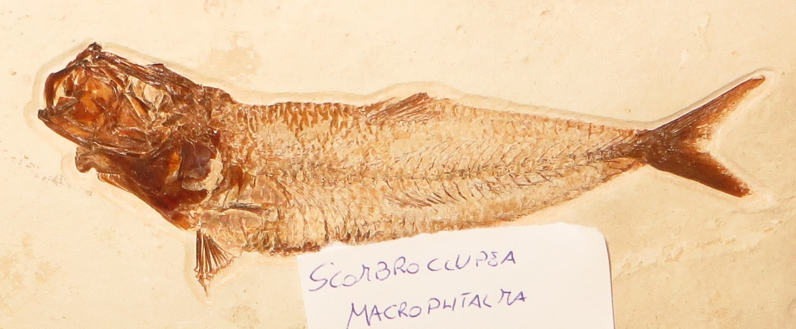 Fossil of Scombroclupea- Took the picture at Museo Scienze Naturali di Faenza